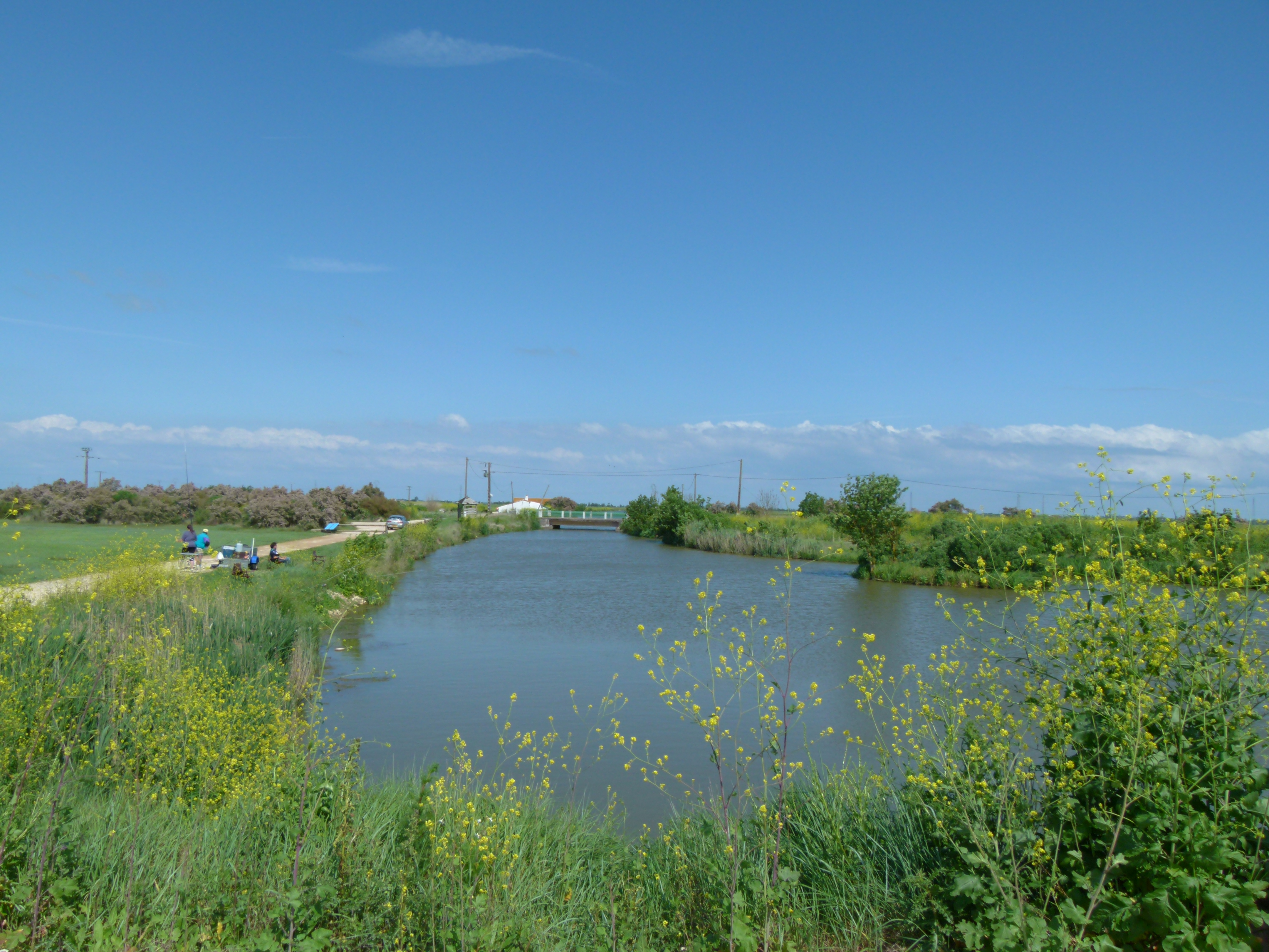 Le canal du Curé avant les portes à flots (commune de Charron - 17)